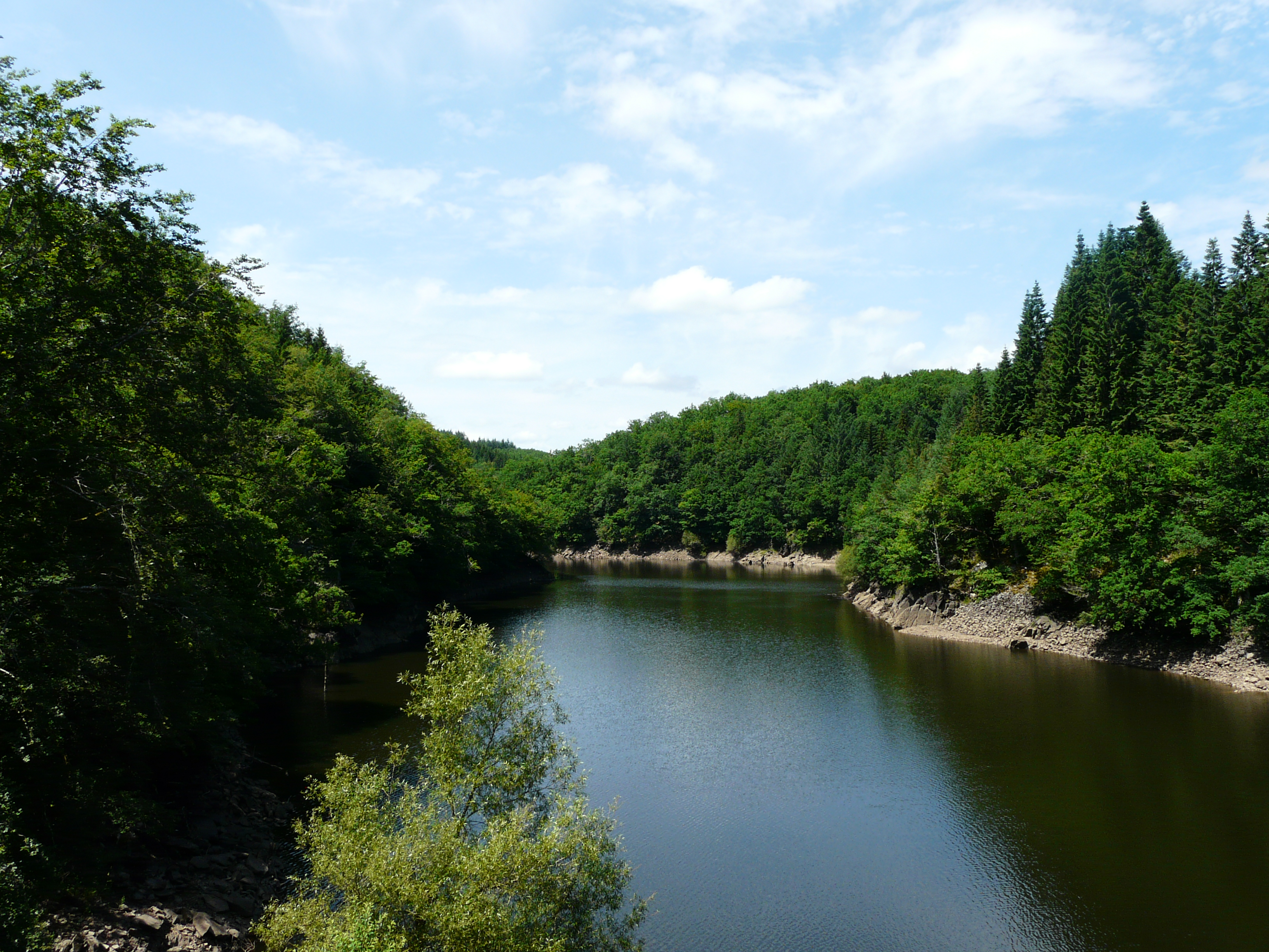 La retenue de la Diège juste en amont du barrage des Chaumettes, entre les communes de Roche-le-Peyroux (à gauche) et Saint-Victour (à droite) ; Corrèze, France.